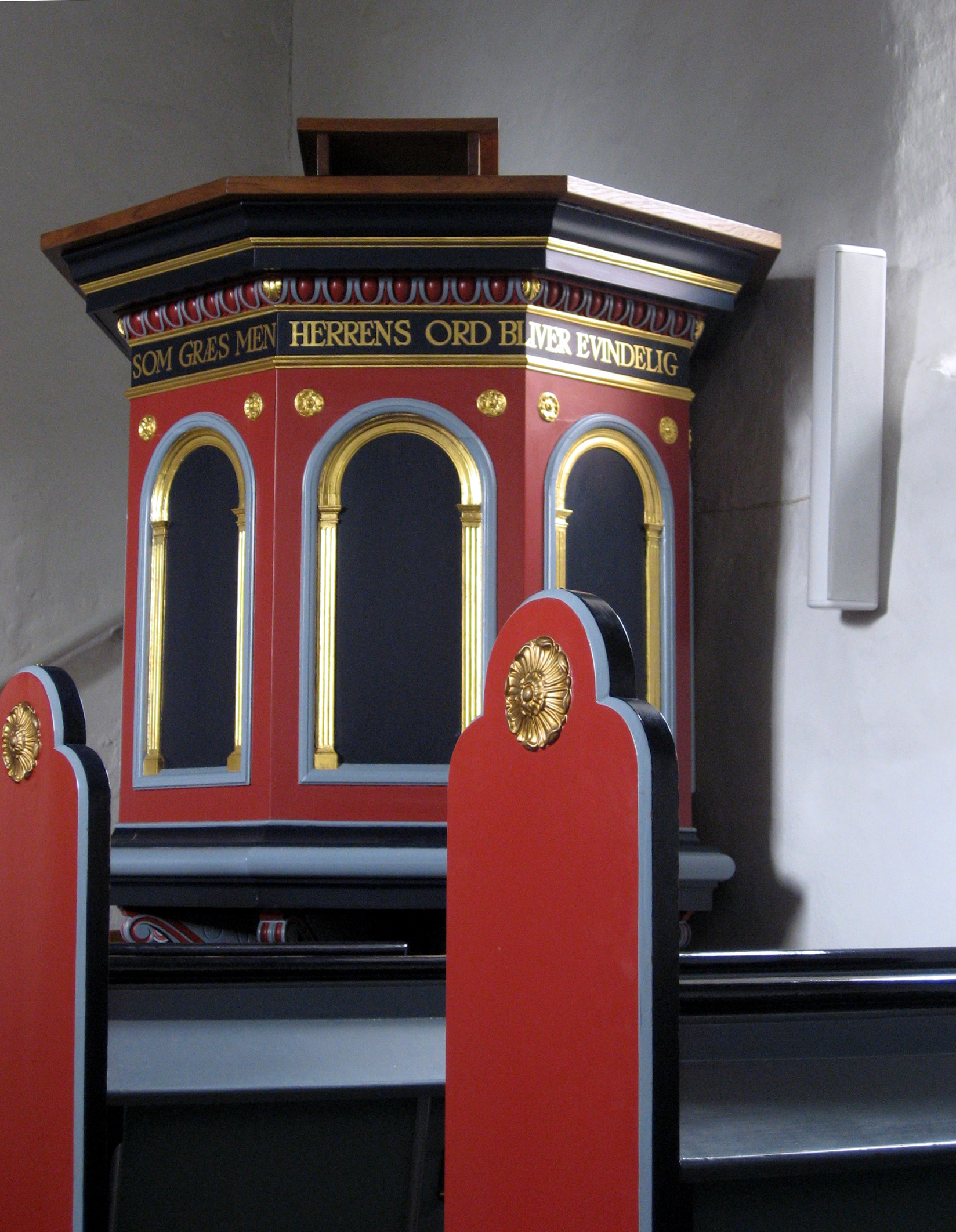 Hasle Kirke in Hasle, Århus, Denmark. Pulpit